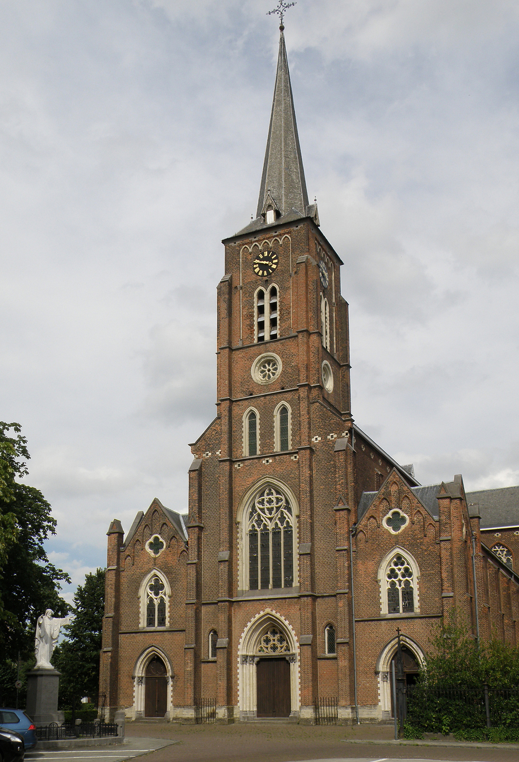 Rumst (prov. Antwerpen, België). Sint-Pieterskerk.